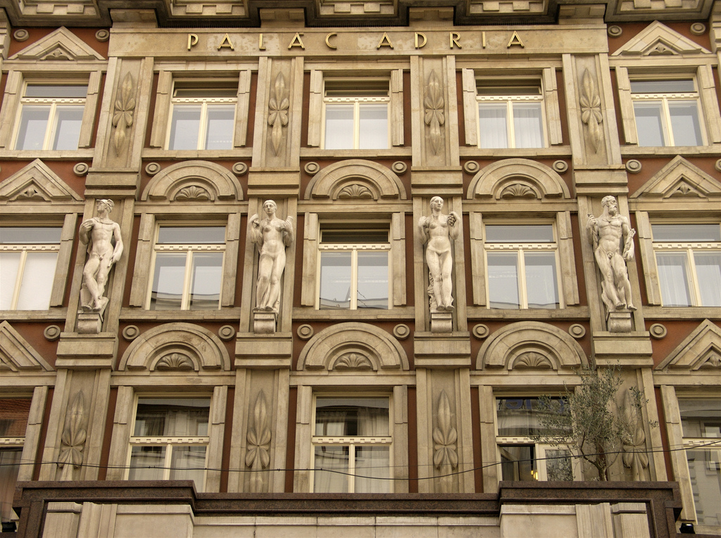 Adria Palace (Palác Adria), Pavel Janák 1922-25, Jungmanova ul. 31, Prague, Czech Republic